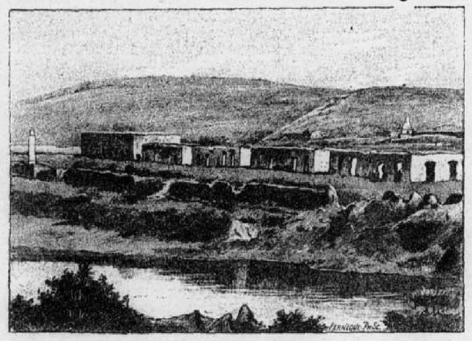 Madagascar et la mission catholique (5e éd.) p. 44